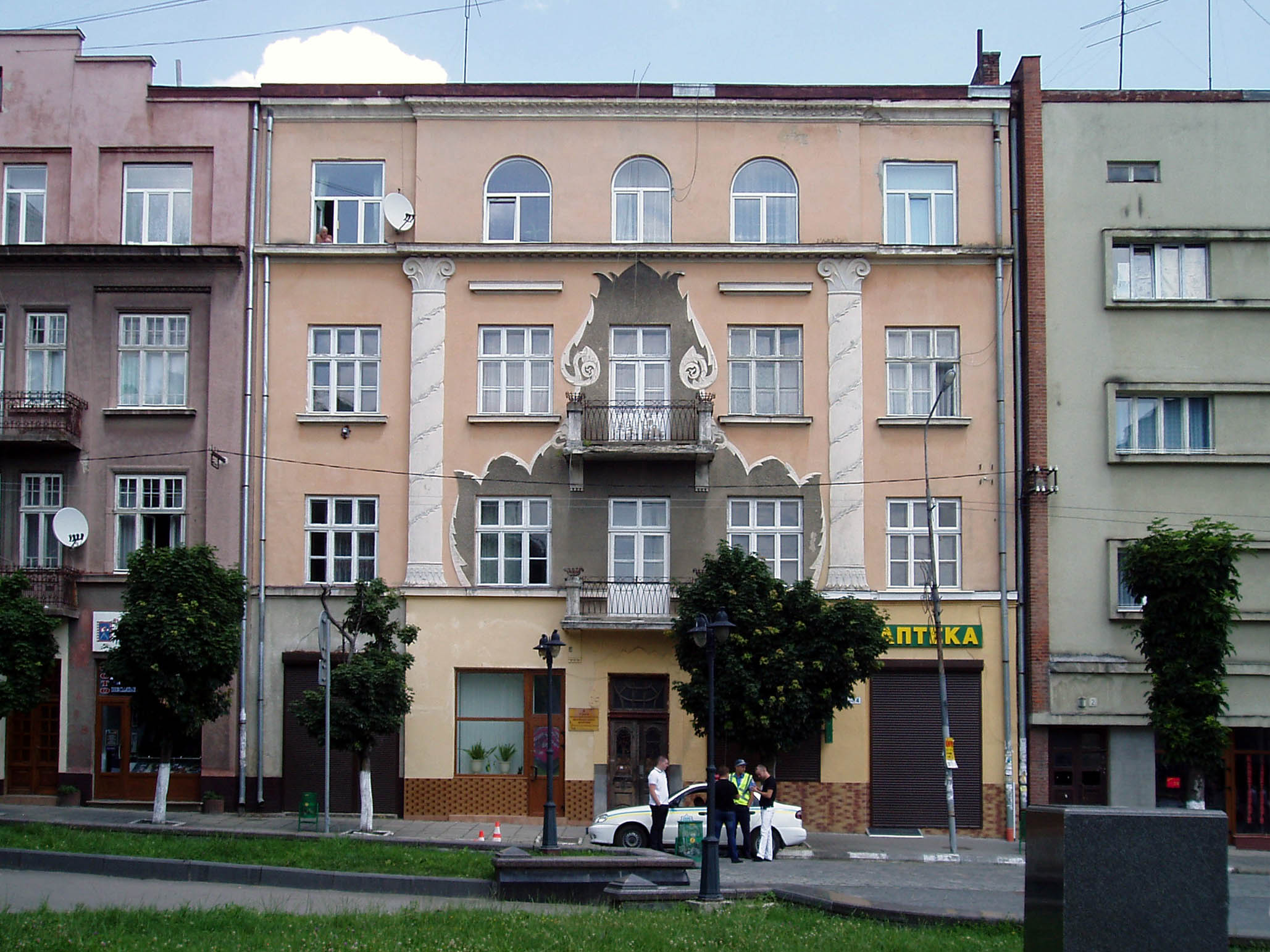 Будинок, № 4 на вулиці Осмомисла у Дрогобичі.